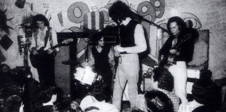 Claudio Gabis zapando con Emilio del Guercio, Rodolfo García y Luis Alberto Spinetta (tres miembros de Almendra) en el boliche "Patacón 99" en 1969. Atras, en el órgano, "Mayoneso", de Los Abuelos de la Nada. Archivo Claudio Gabis